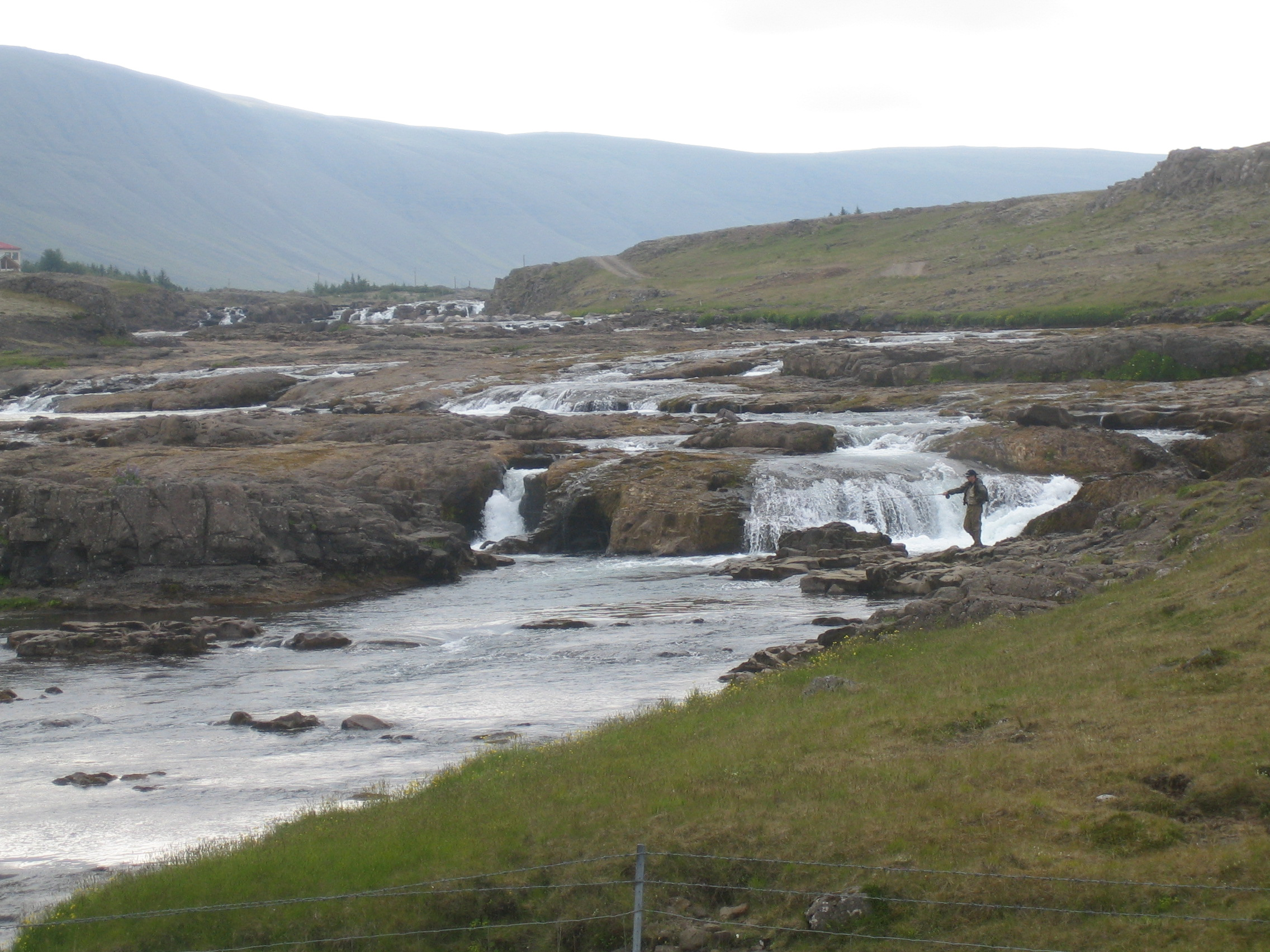 Laxá í Hvalfirði